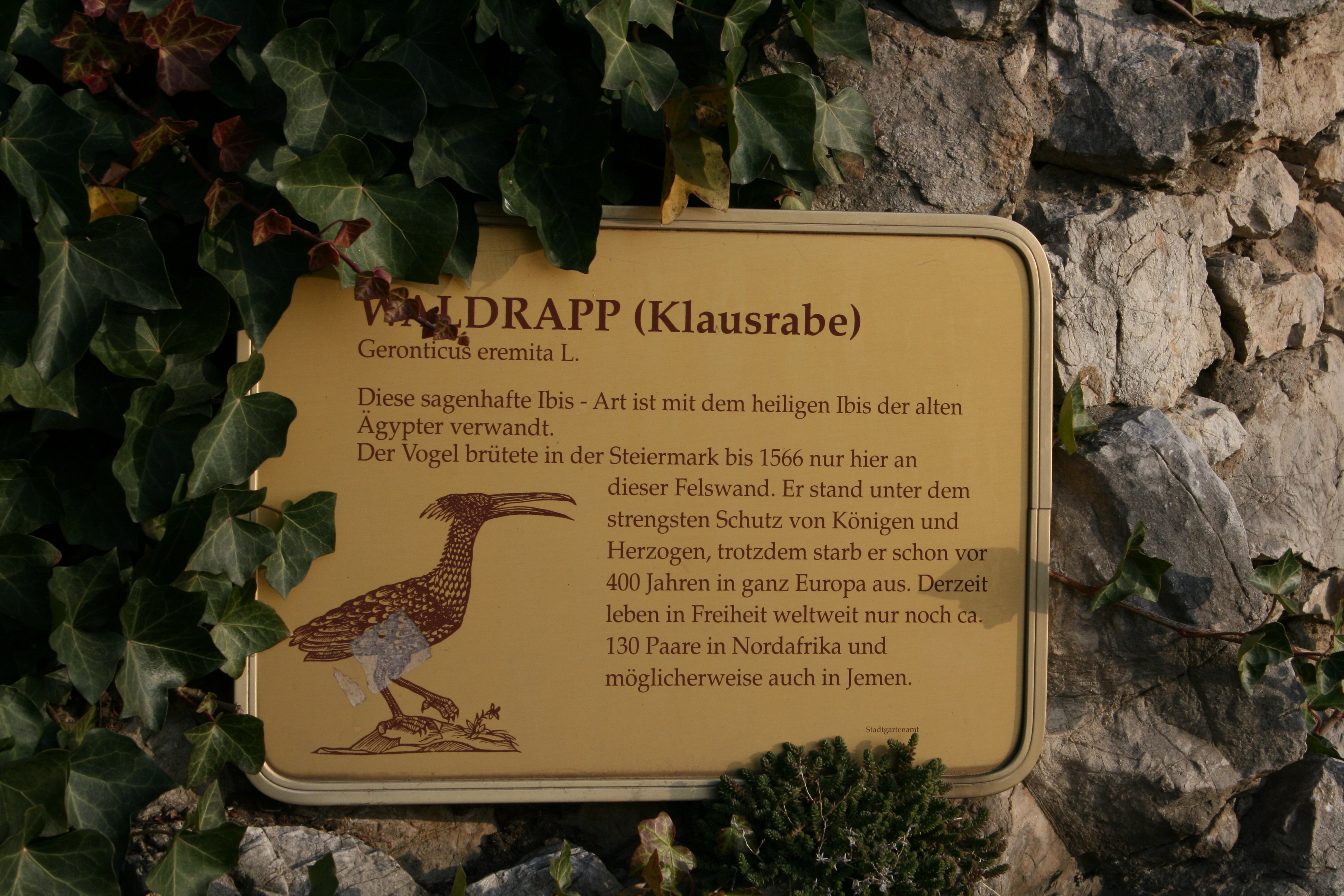 Graz, Austria: Informationstafel über den Waldrapp am Schlossberg (im Bereich des Kriegssteiges)